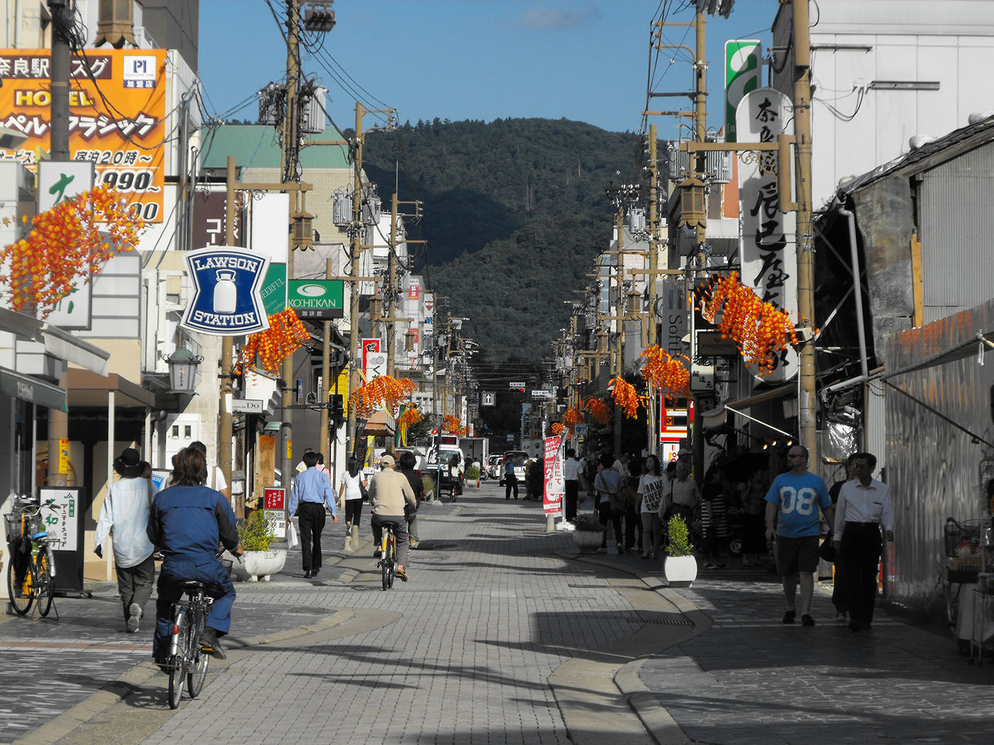 Sanjo Street, Nara, Japan